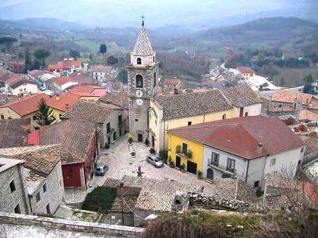 Vista della Piazza del Carmine dalla Grazionella, San Marco dei Cavoti; Campania